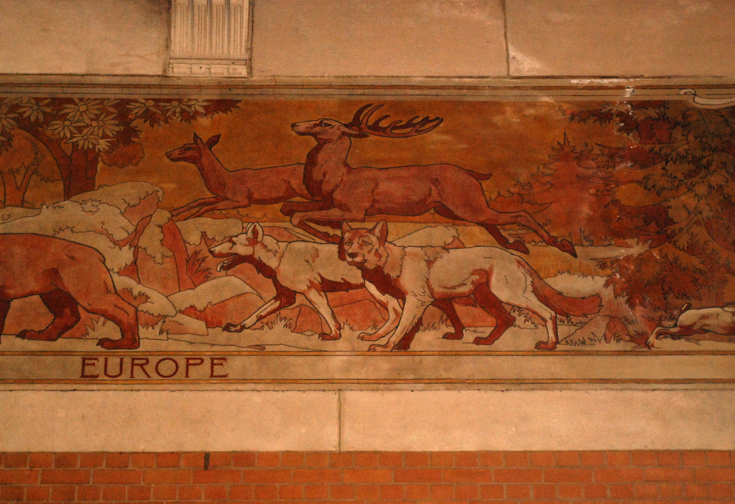 Belgique - Bruxelles - Koekelberg - Ancienne école communale des filles - sgraffite d'Adolphe Crespin (1909)